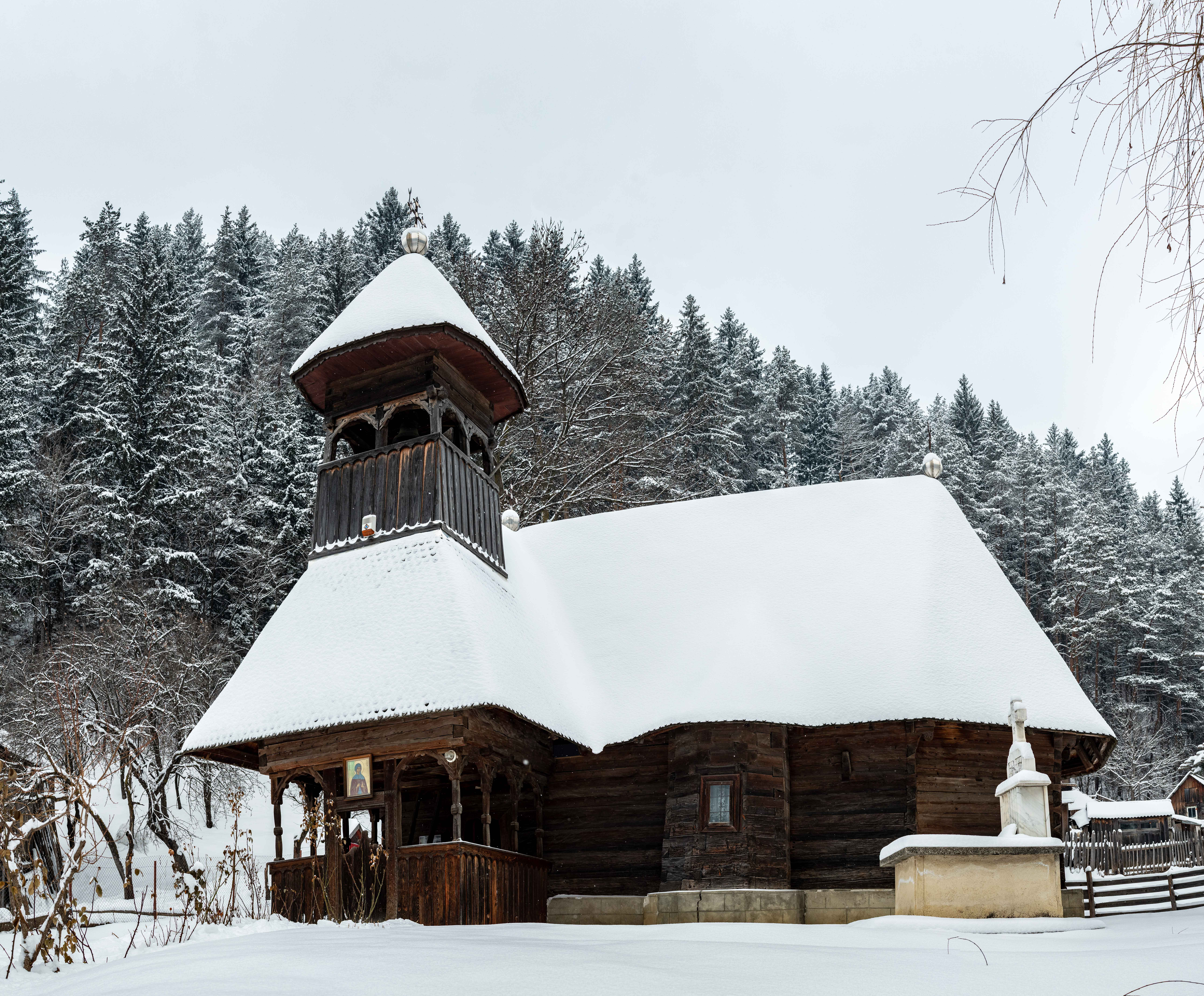 Biserica de lemn "Sfânta Cuvioasă Parascheva" din satul Farcașa, fotografie din luna Ianuarie, anul 2019